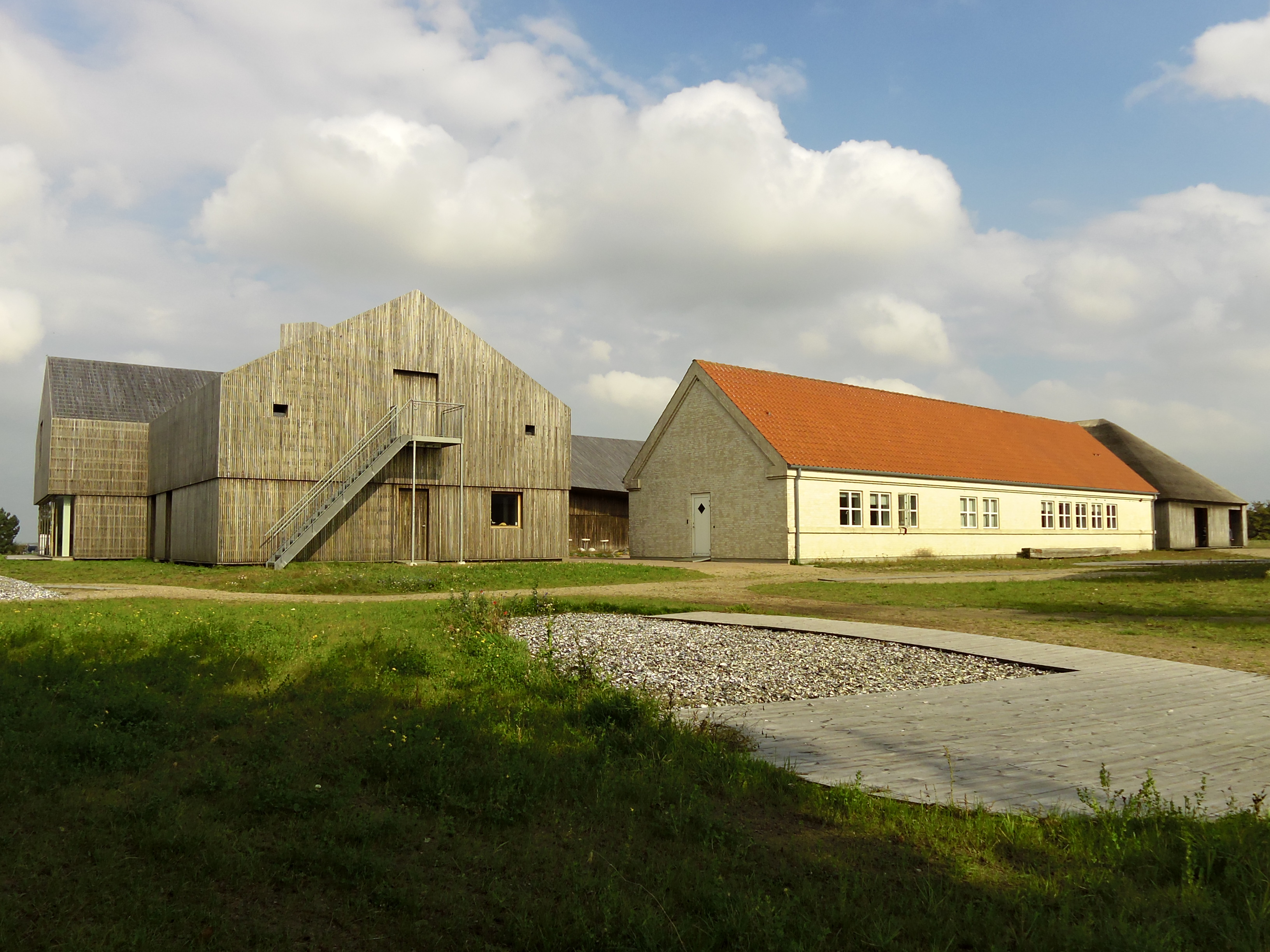 Vadehavscentret